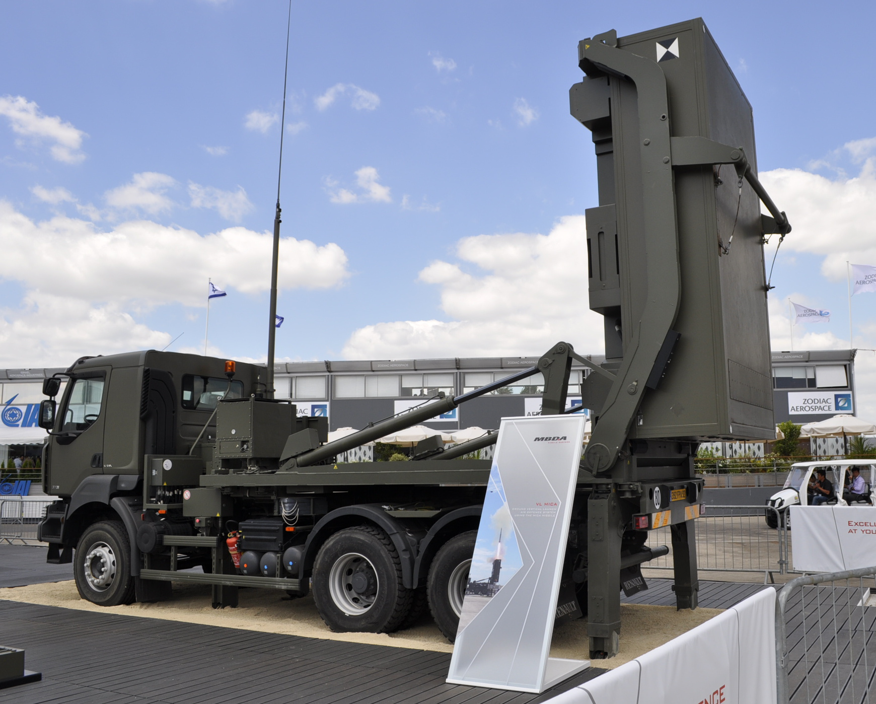 Lanceur terrestre du missile "VL Mica" Exposition MBDA au salon du Bourget 2015